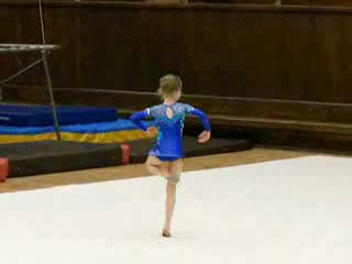 Juvanile gymnast